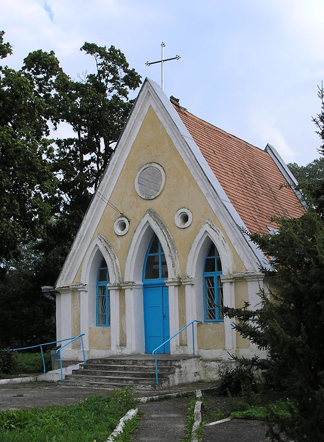 Беларуская (тарашкевіца): Сьвяцак